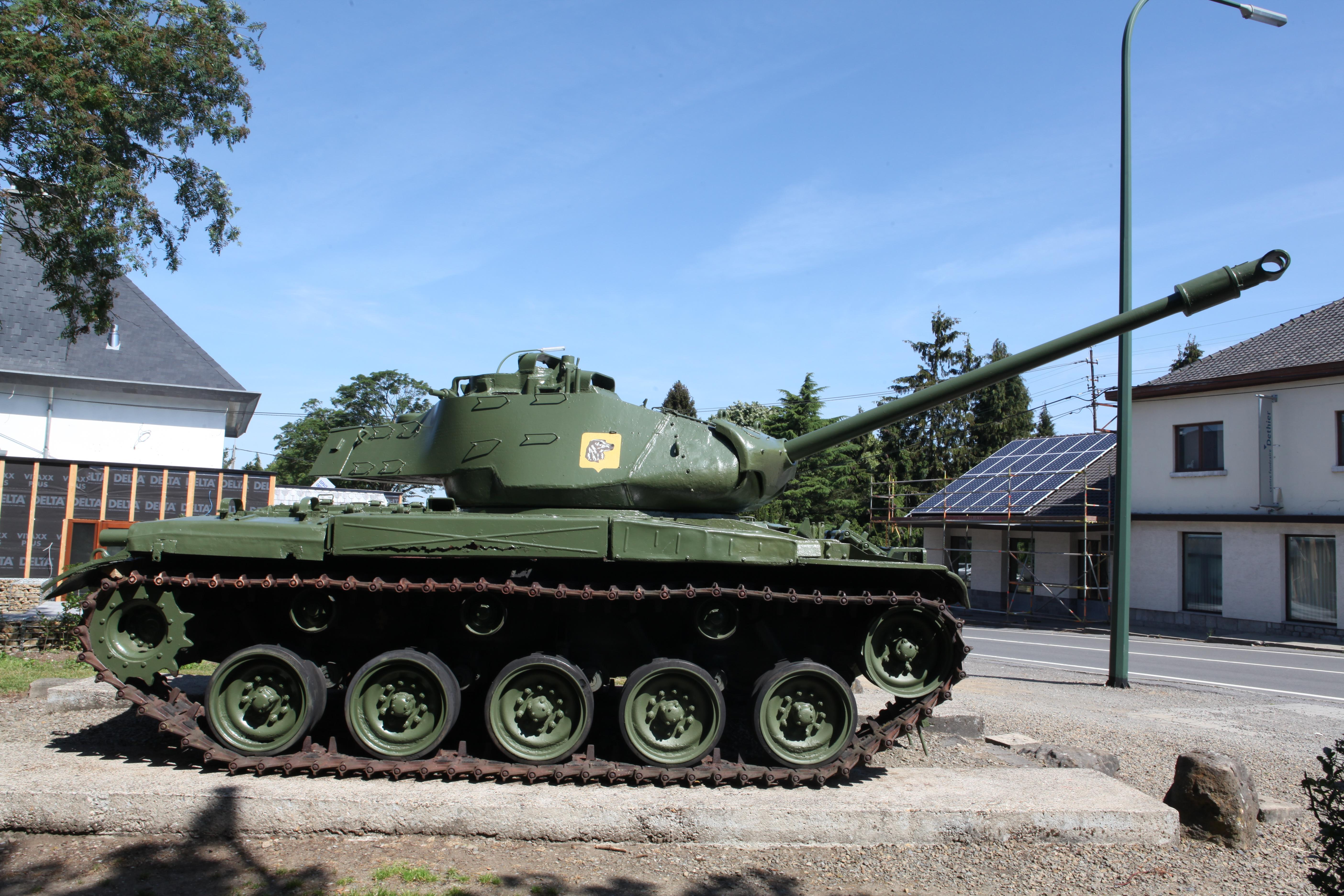 M 41 Walker Bulldog